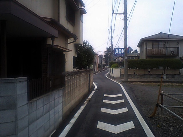 川越市大字扇河岸字八斗蒔